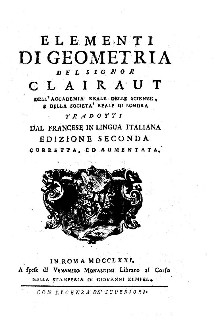 Elementi di geometria del signor Clairaut dell'Accademia reale delle scienze, e della Societa reale di Londra tradotti dal francese in lingua italiana. - In Roma : a spese di Venanzio Monaldini libraro al Corso : nella Stamperia di Giovanni Zempel, 1771. - XXXI, [1], 256 p., XIV c. di tav. ripiegate : ill. ; 8º .